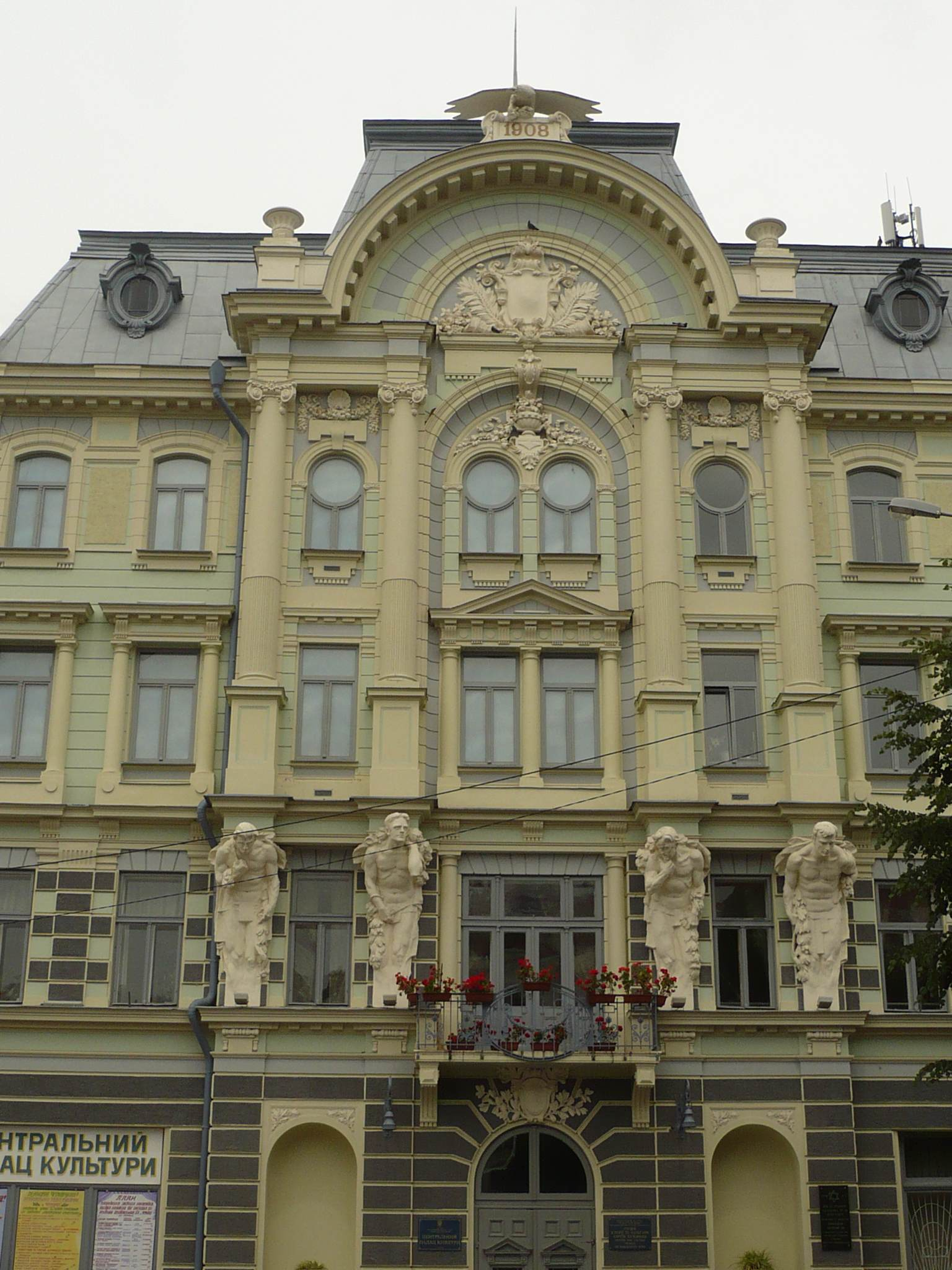 Czerniowce, Dom Żydowski, 12.7.2009